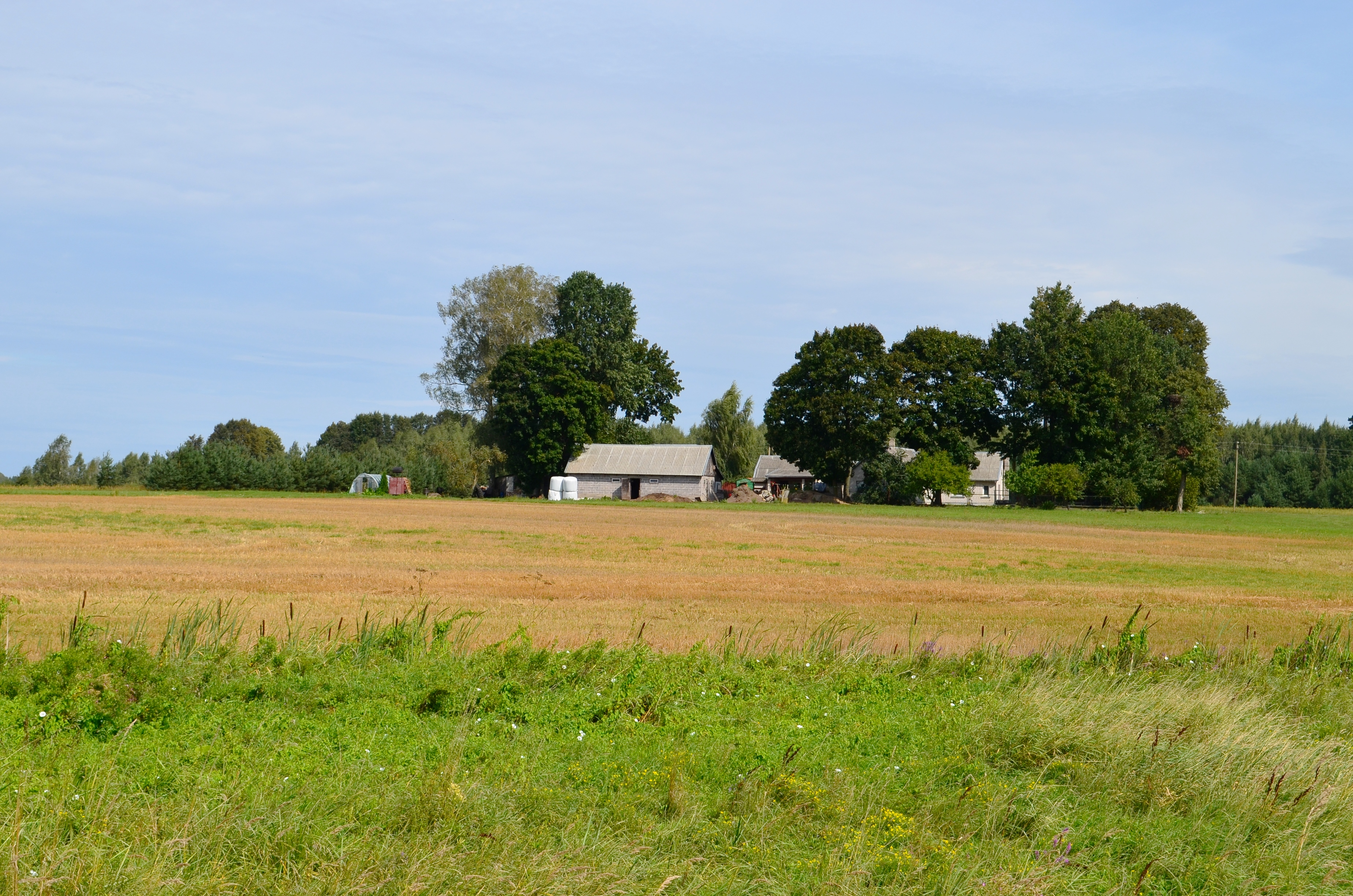 Nendriniai, Marijampolės sav.